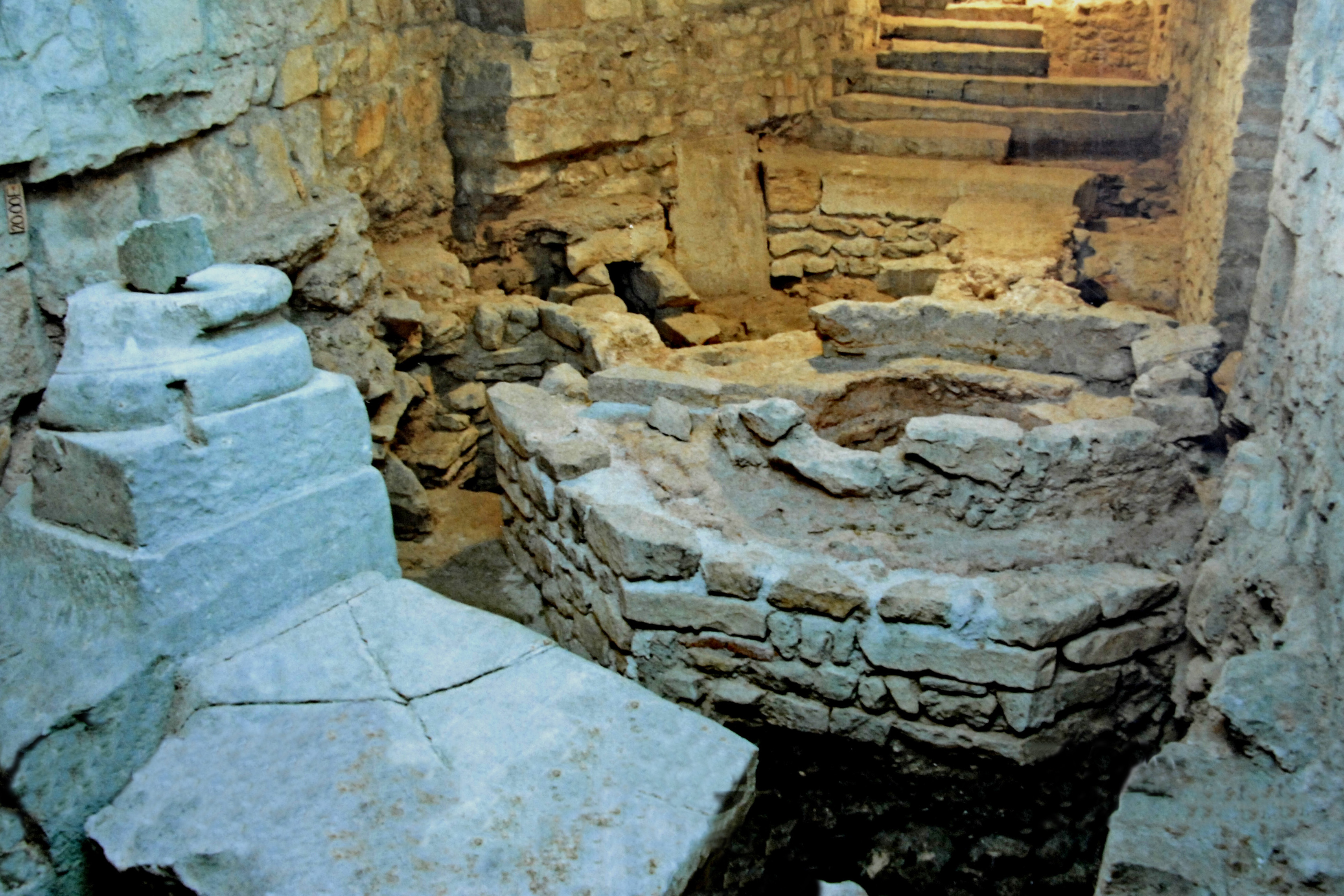 Kathedrale Nevers, Baptisterium unter Boden der Kirche